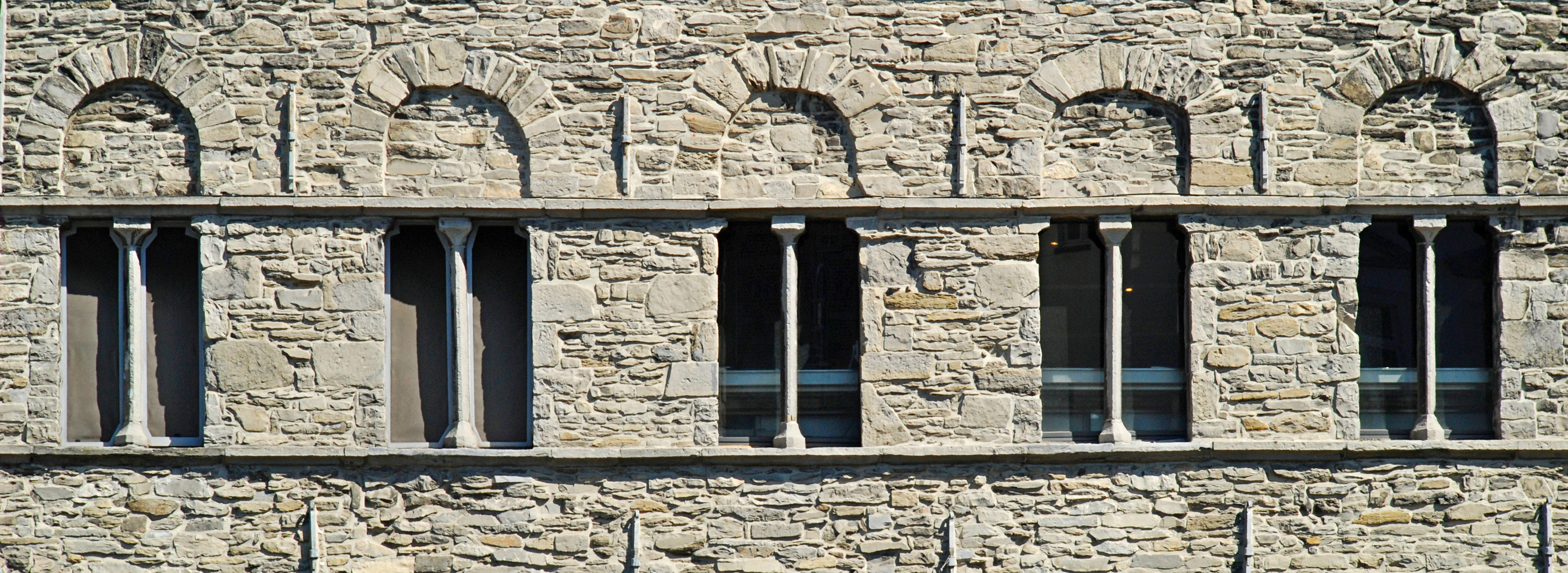 Belgique - Gand - maison romane dite "Spijker"